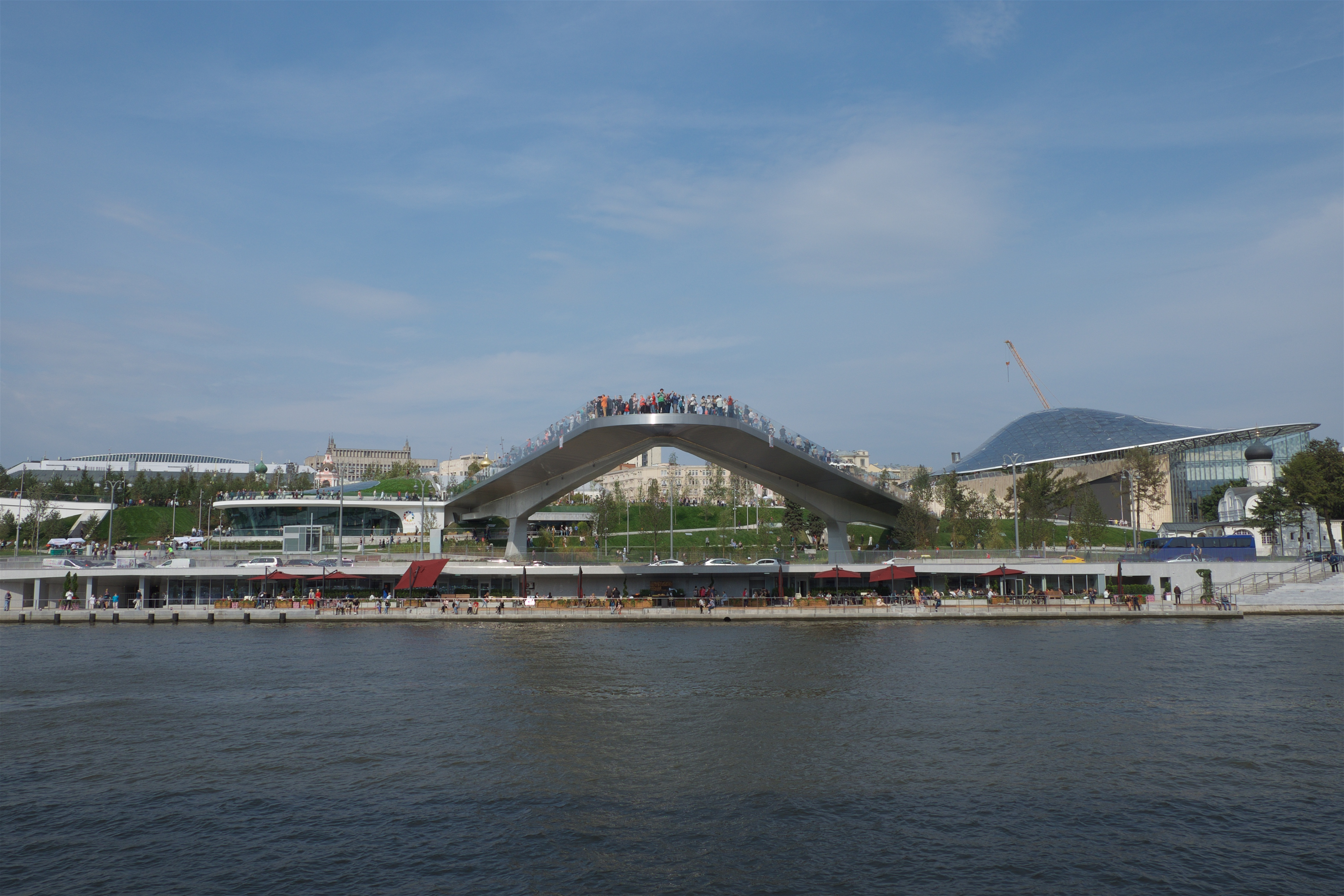 Zaryadye Природно-ландшафтный парк «Зарядье», Zaryadye Park, Parc Zariadié